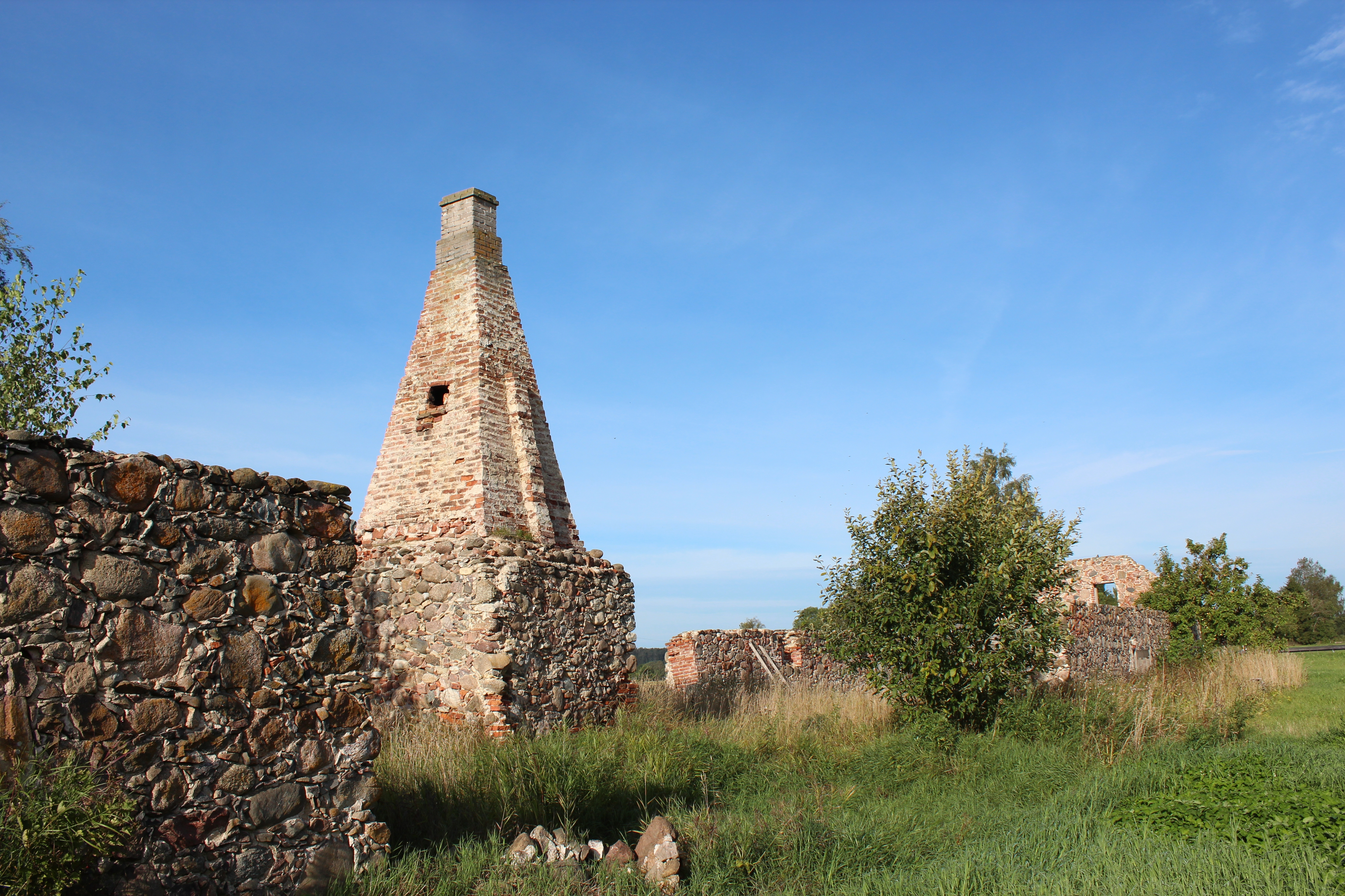 Õuna kõrtsi varemed